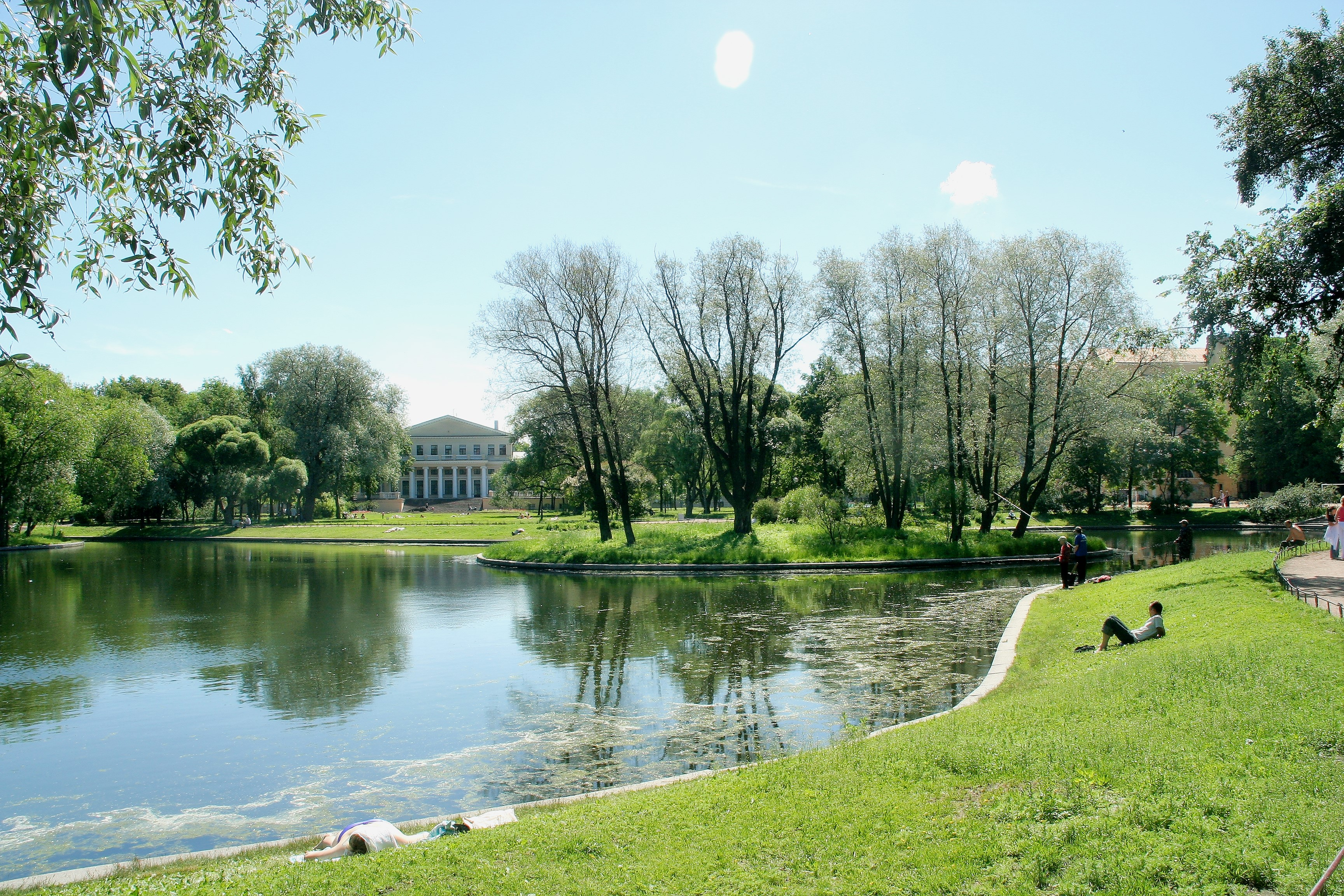 Jussupow Palais und Park